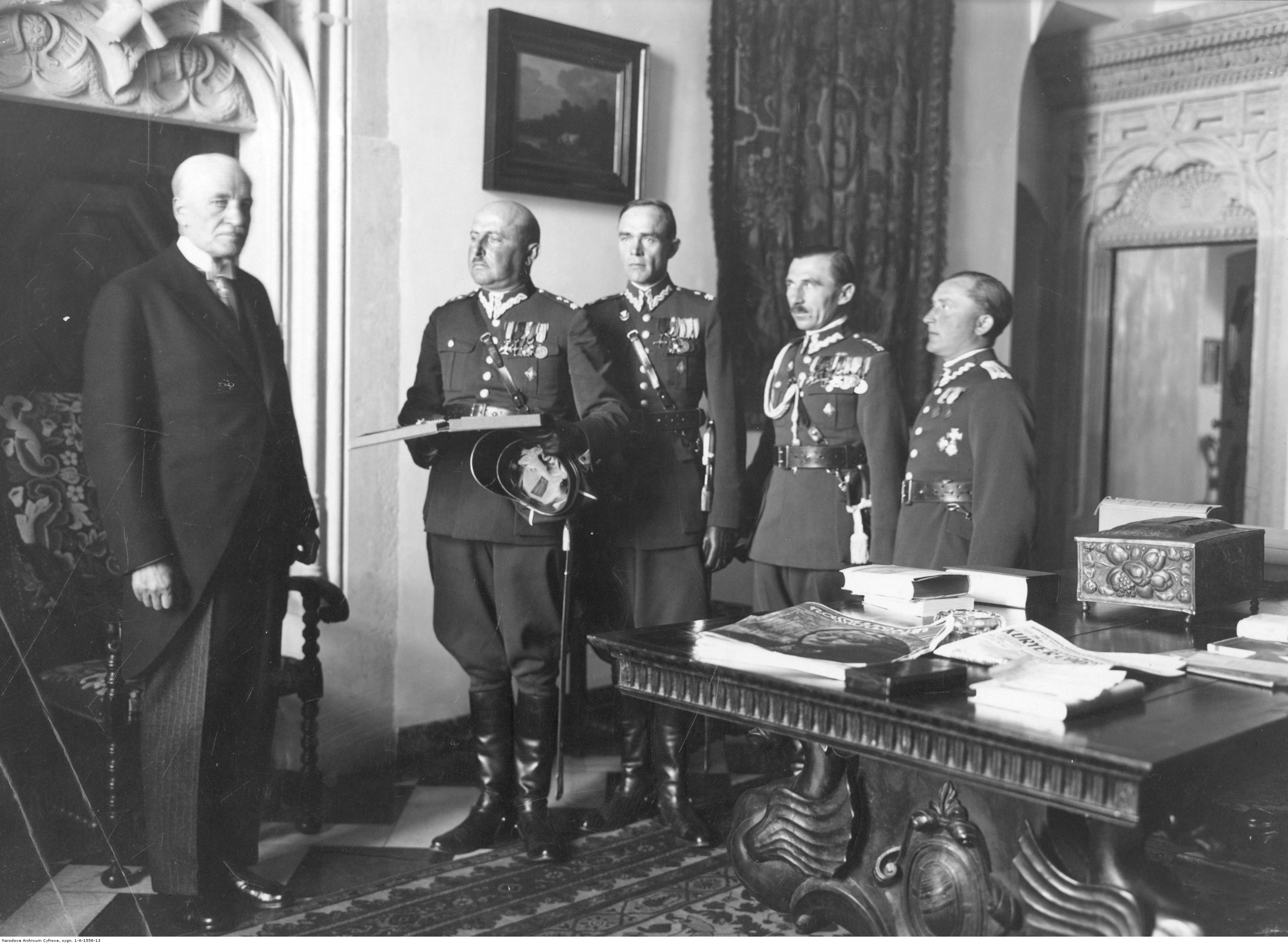 Wizyta prezydenta RP Ignacego Mościckiego w Krakowie. Delegacja 20 pułku piechoty w składzie: ppłk Kazimierz Brożek, mjr Czerwiński, kpt. Tadeusz Pszonczak, st. sierż. Ludwik Rodzina wręcza prezydentowi RP Ignacemu Mościckiemu odznakę pułkową; czerwiec 1934.